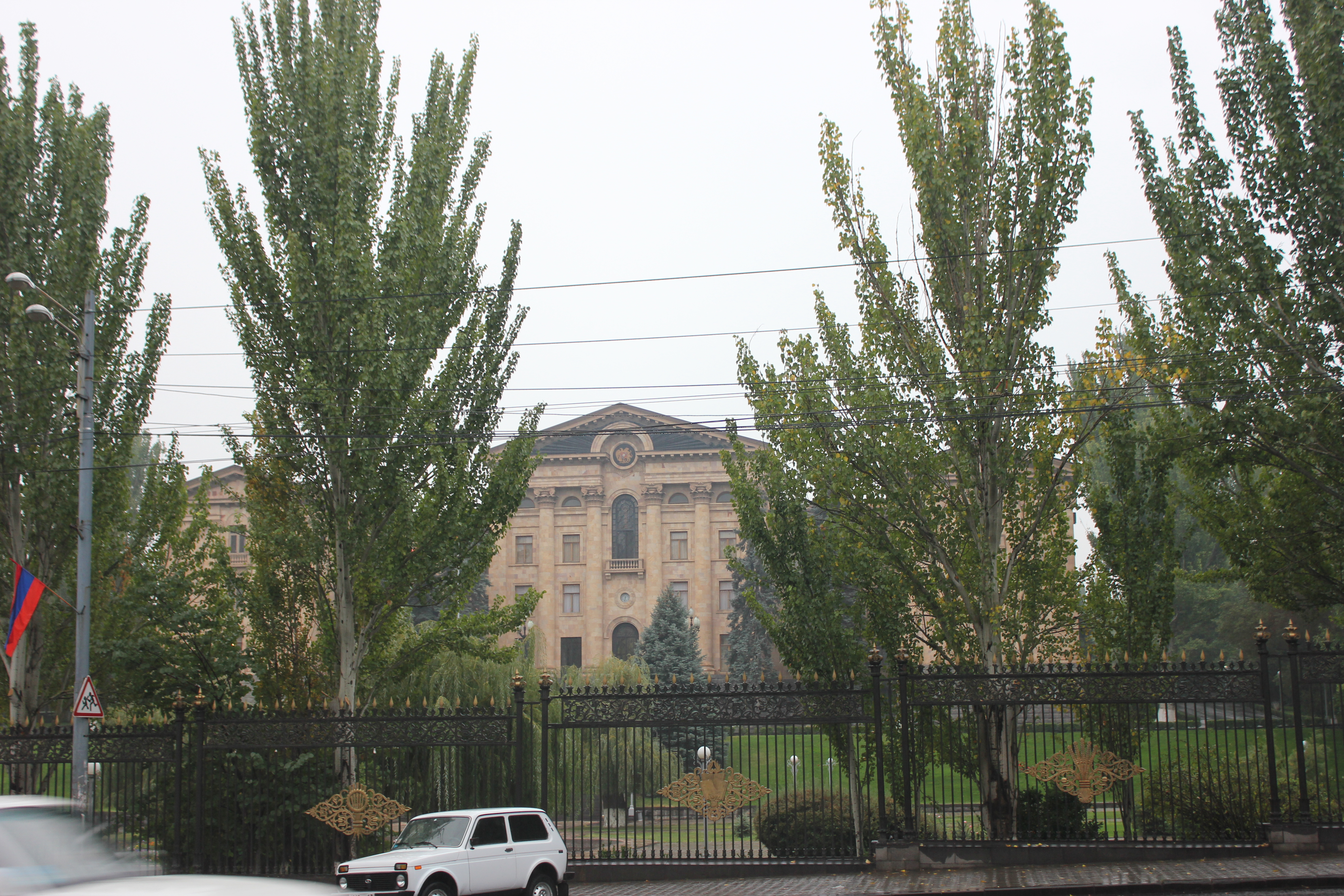 ՀՀ Ազգային Ժողովի շենք 1949-1950 թթ. Մարշալ Բաղրամյան պող. 19, Ճարտ.` Մ. Գրիգորյան, 1951 թ., ԽՍՀՄ պետմրցանակ, Վրկռ` 1967 թ., 1982 թ., նախկինում՝ Հայաստանի կոմունիստական կուսակցության կենտրոնական կոմիտեի վարչական շենք 6/164